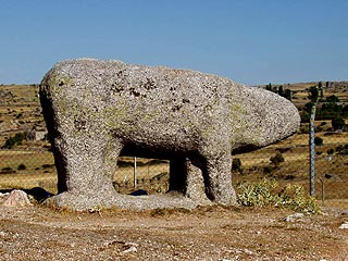 Verraco de Mingorría, escultura vettona, junto a la Ermita de Mingorría.